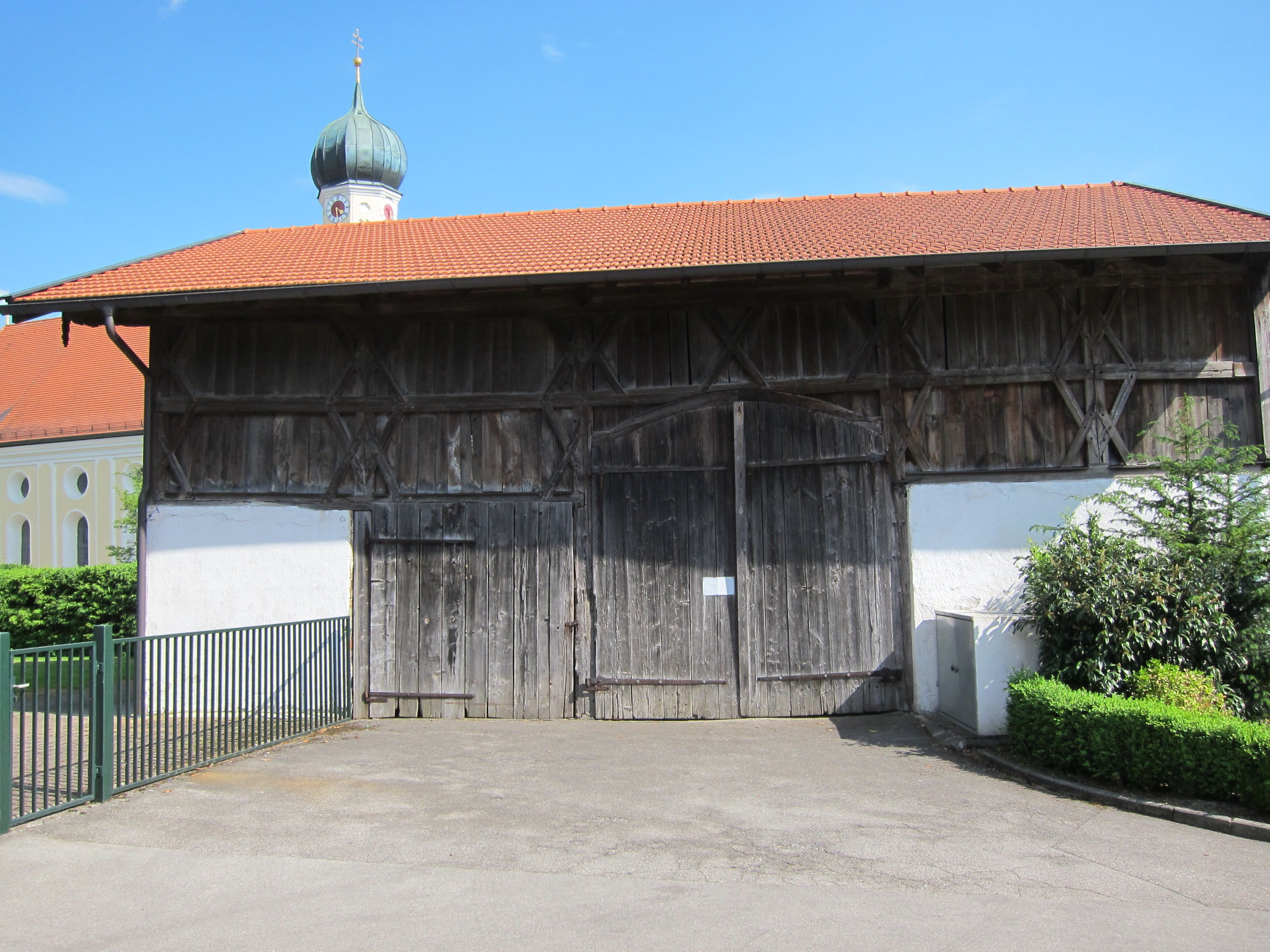 Pöring, Burgstr. 32; Zugehöriger Stadel, Bundwerk, 1. Hälfte 19. Jahrhundert.